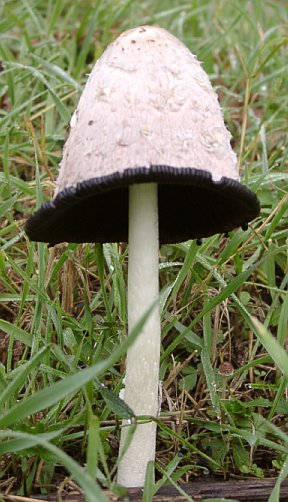 Ein ausgewachsener Schopftintling (Coprinus comatus) von vorn